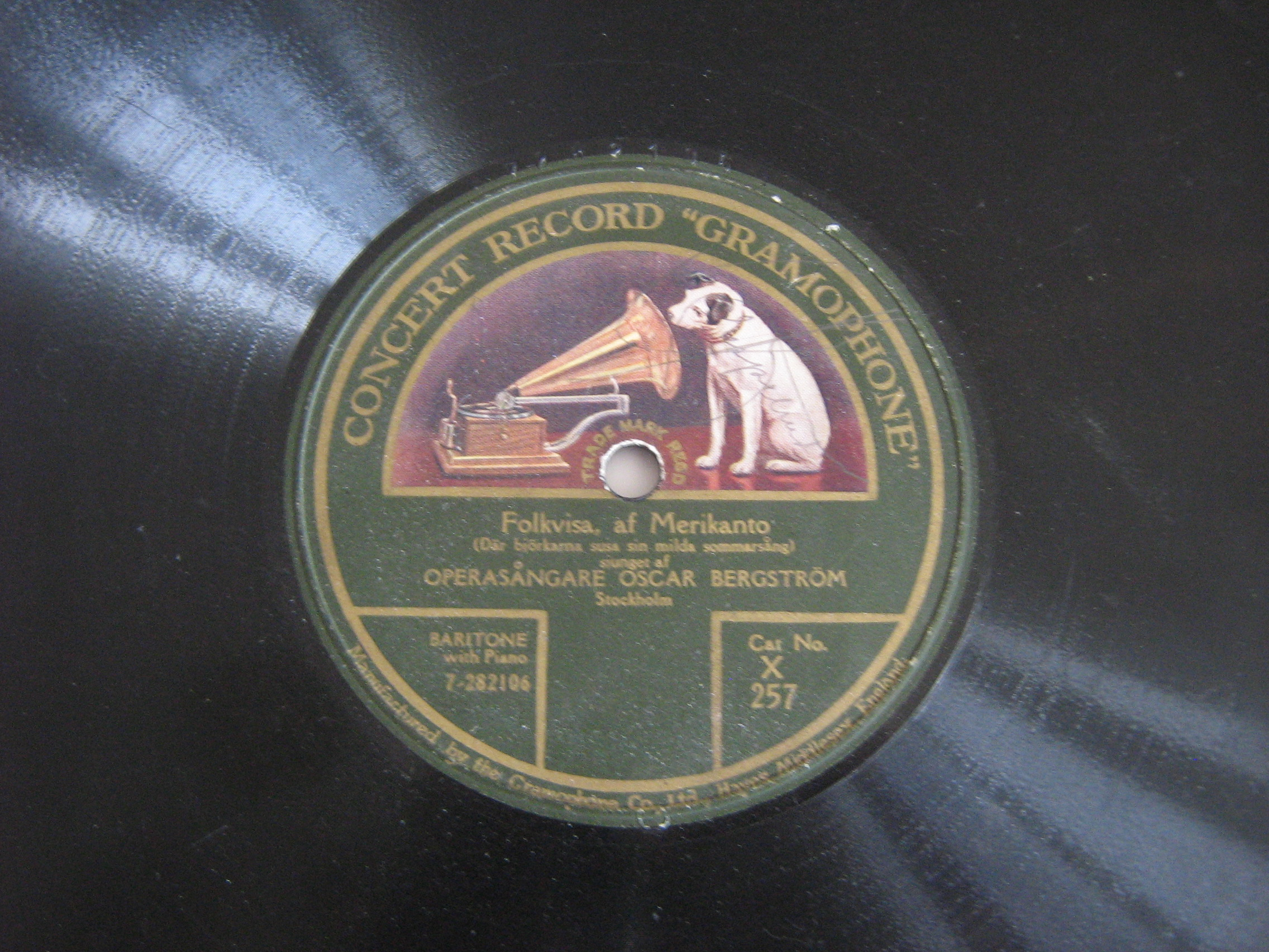 Där björkarna susa, skivinspelning med Oscar Bergström 1919